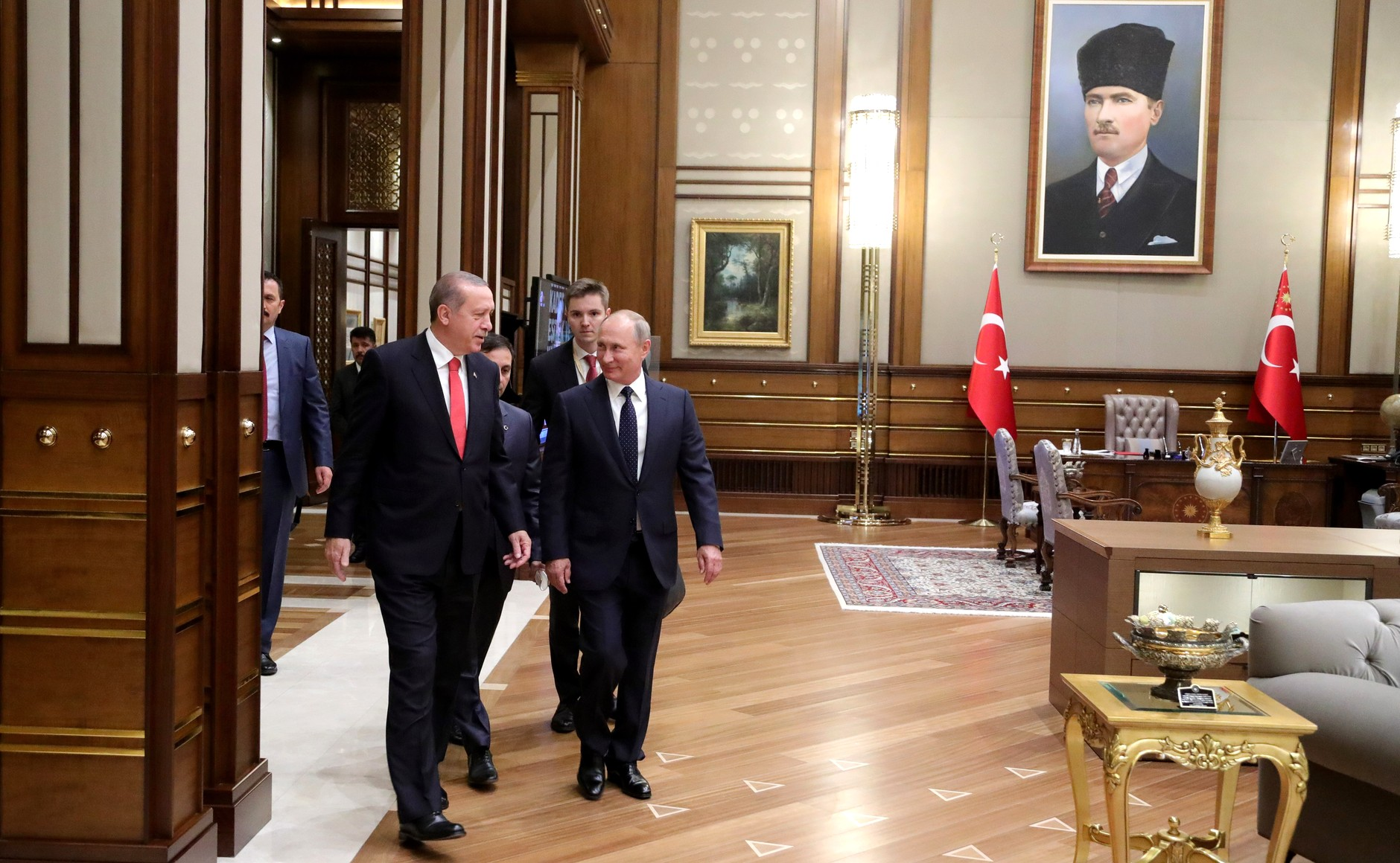 Встреча Президента Российской Федерации Владимира Путина с Президентом Турецкой Республики Реджепом Тайипом Эрдоганом